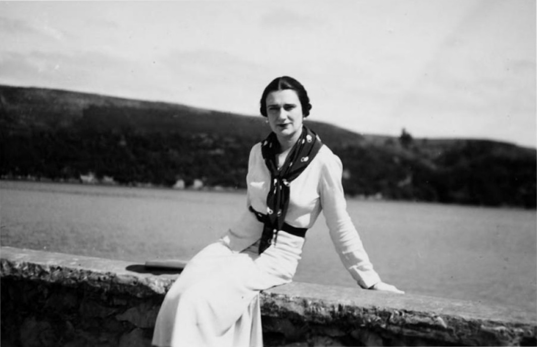 Bebé Vicuña (María Manuela Vicuña Herboso, 1892-1961), esposa de Carlos Morla Lynch en Somo, Santander